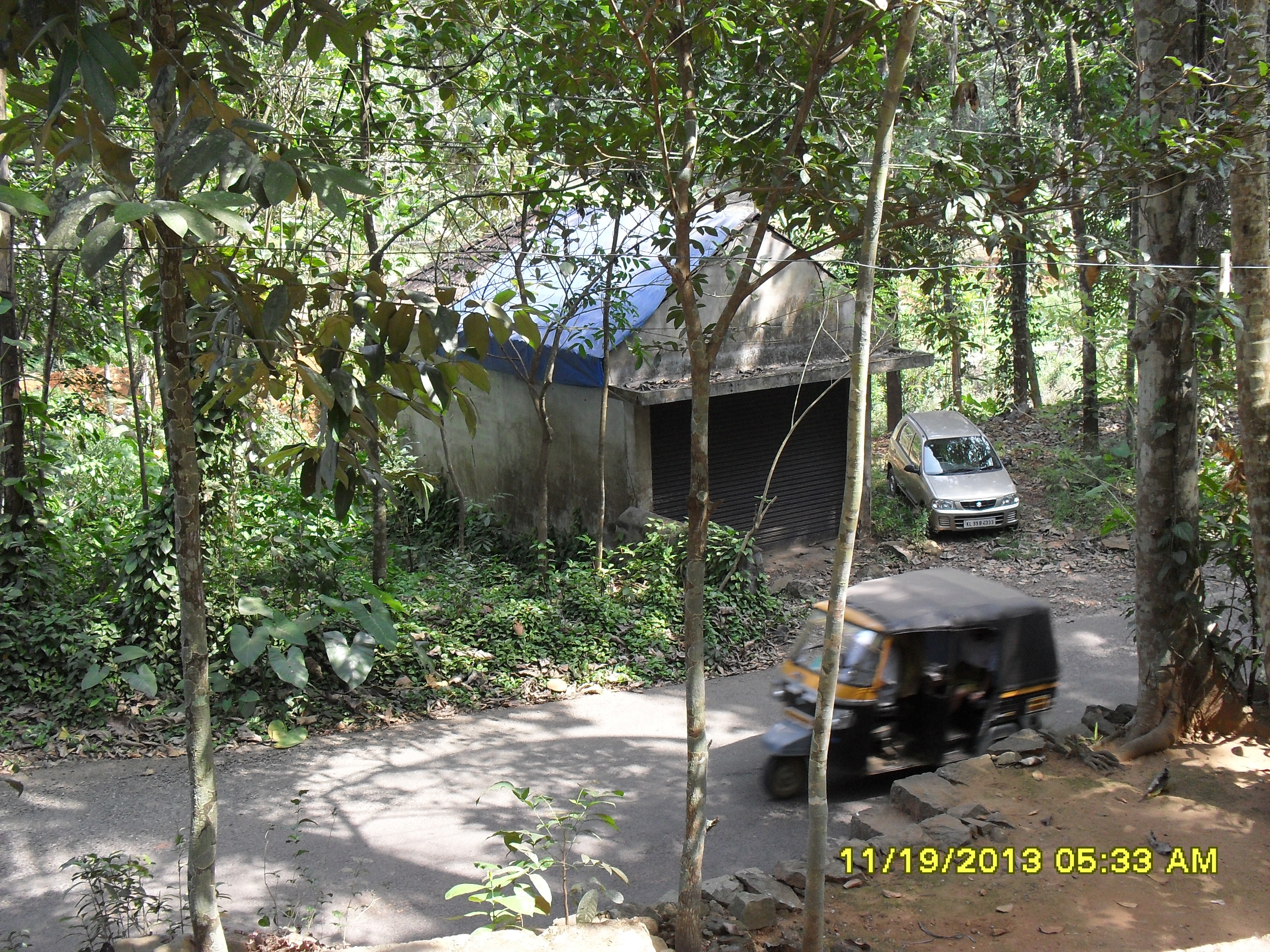 Pathampuzha Road